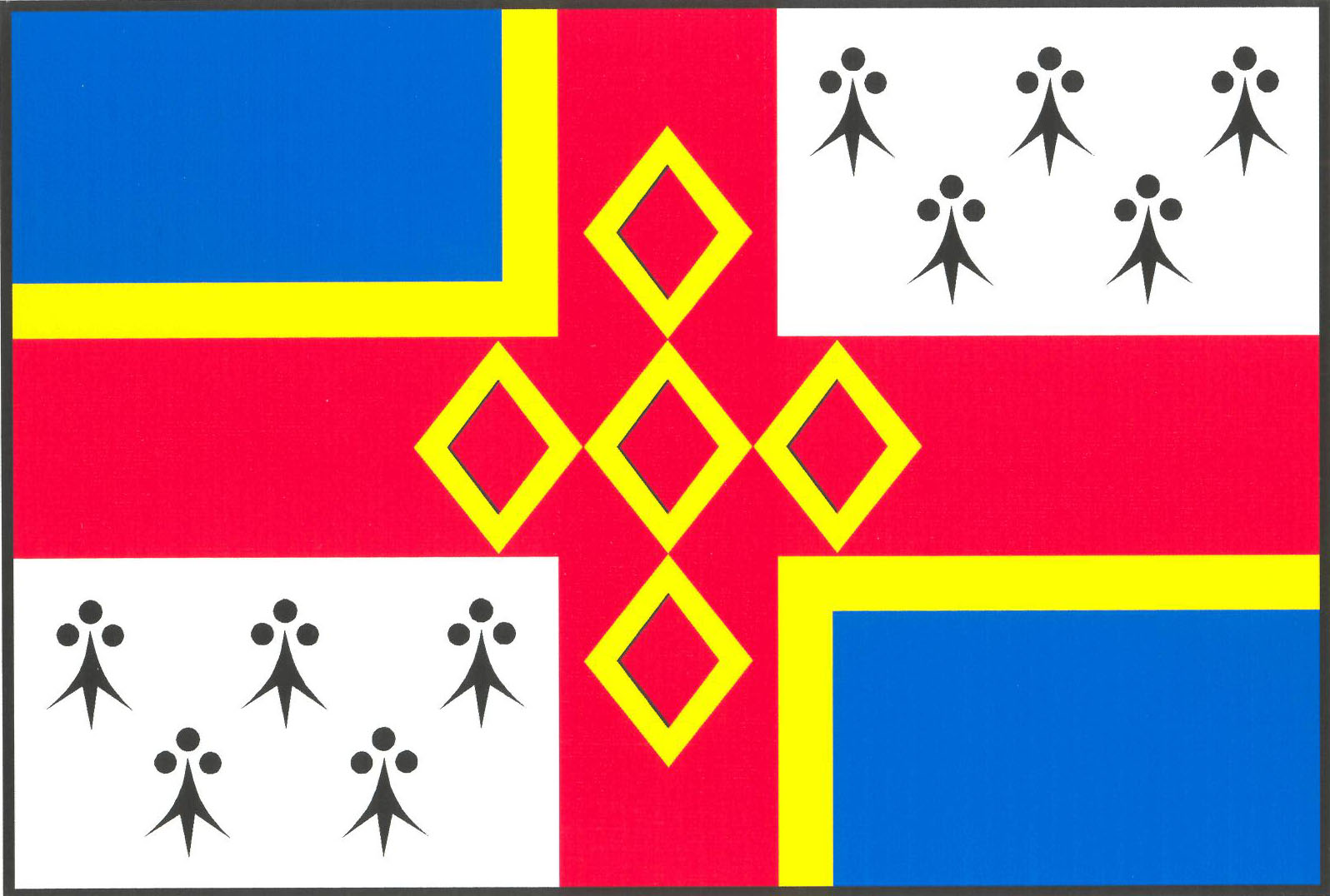 Vlajka obce Nebužely